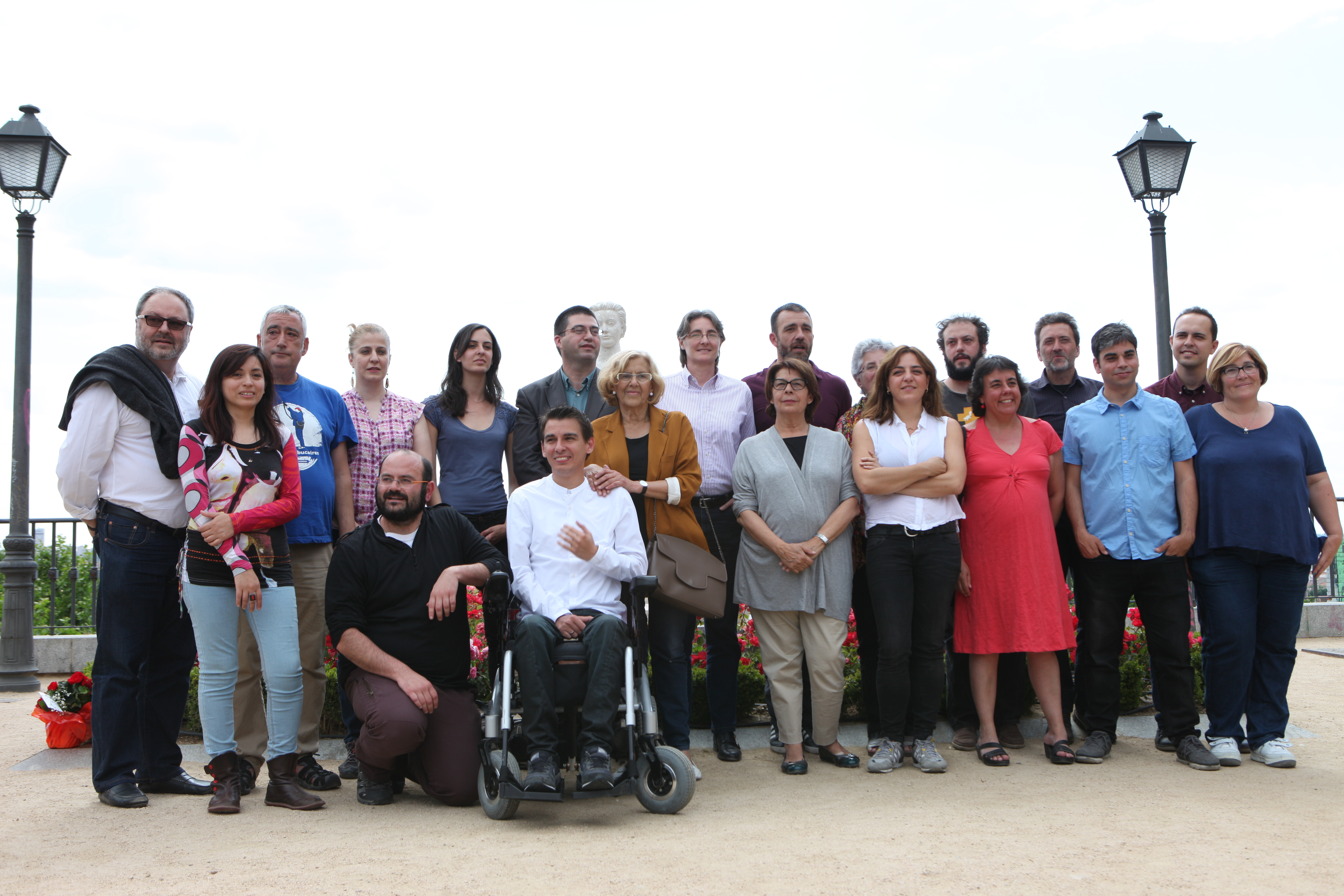 Presentación de los 20 concejales electos de Ahora Madrid en el parque de la Dalieda de San Francisco (25 de mayo de 2014). Foto de David Arenal.